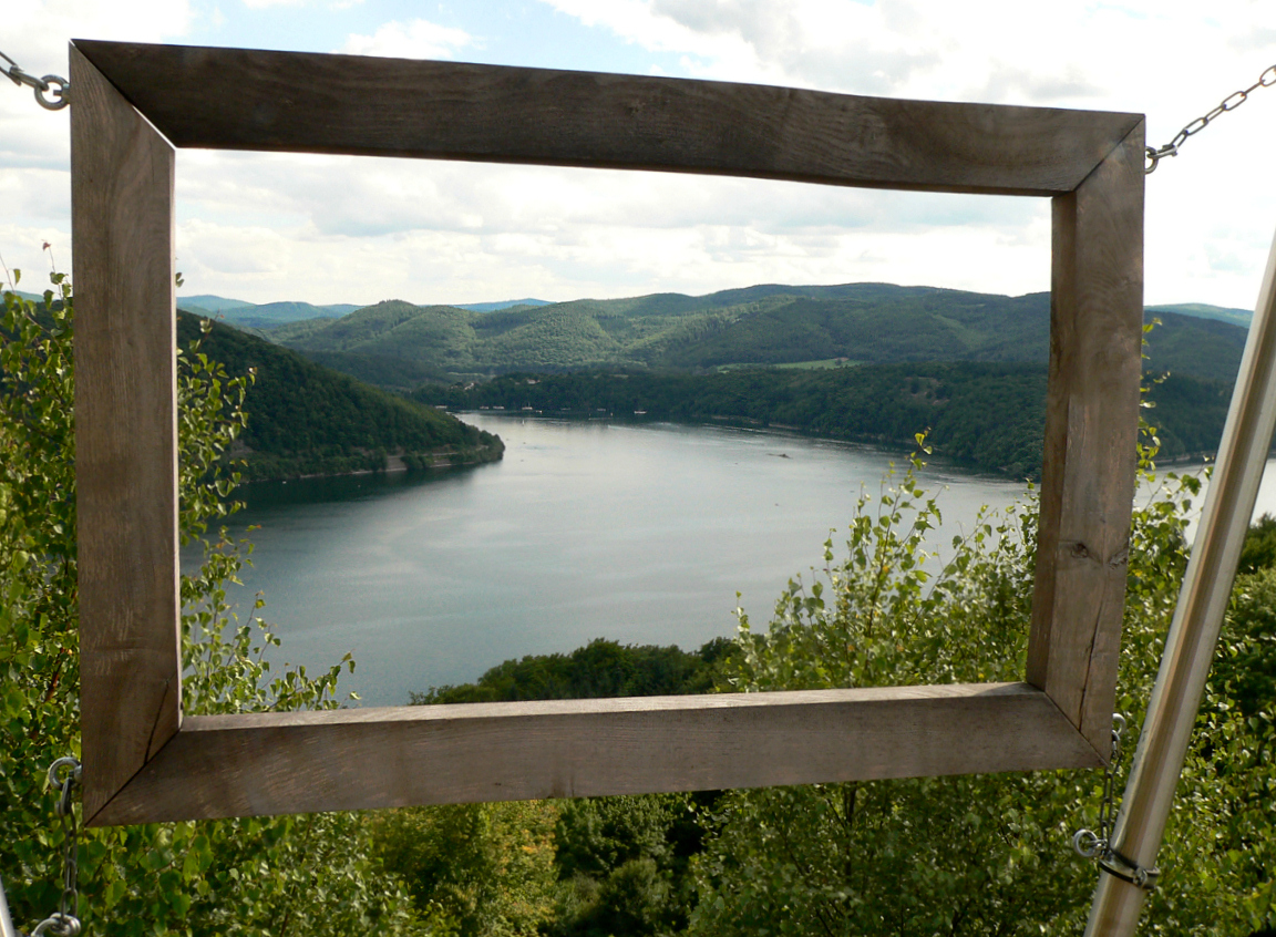 Edersee mit Bilderrahmen vom Elsterberg in Waldeck